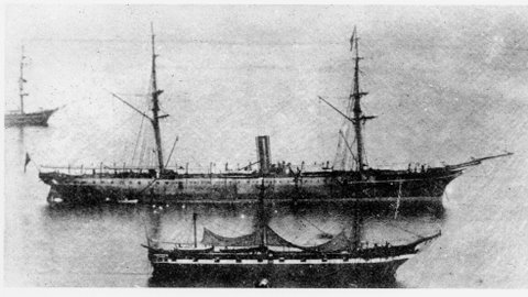 Les paquebots RMS Rhone et Solent de la Royal Mail Steam Packet Company au port de Saint Thomas (Caraïbes)à vers 1865. Le Rhone sera coulé en 1867 par un cyclone